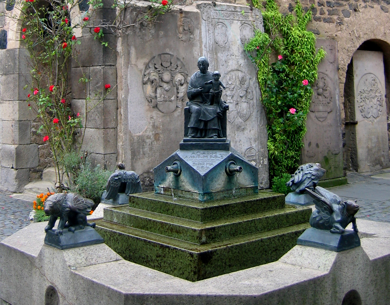 Marienbrunnen (1987–89) von Jochem Pechau/Theo Heiermann vor dem Portal der Schwarzrheindorfer Doppelkirche